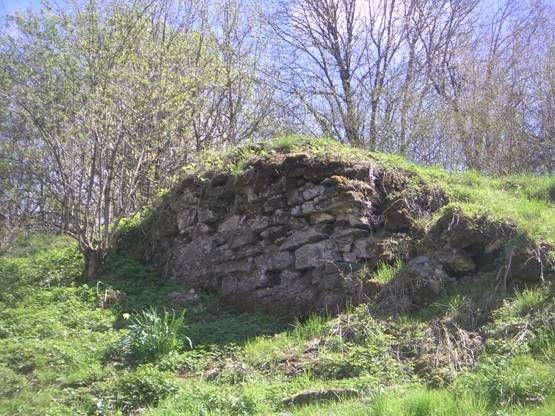 Mauerrest des ehemaligen Ansitzes Halbenstein in Hörbranz-Backenreute, Vorarlberg oberhalb des Weges zur Ruggburg